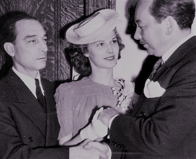 Buster Keaton e la sua terza moglie Eleanor nel giorno del loro matrimonio